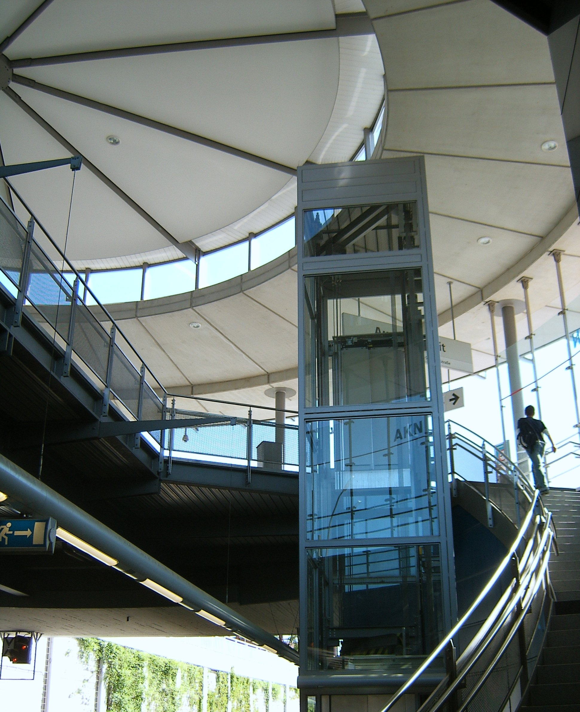 Bahnhof Eidelstedt-Zentrum der AKN in Eidelstedt.